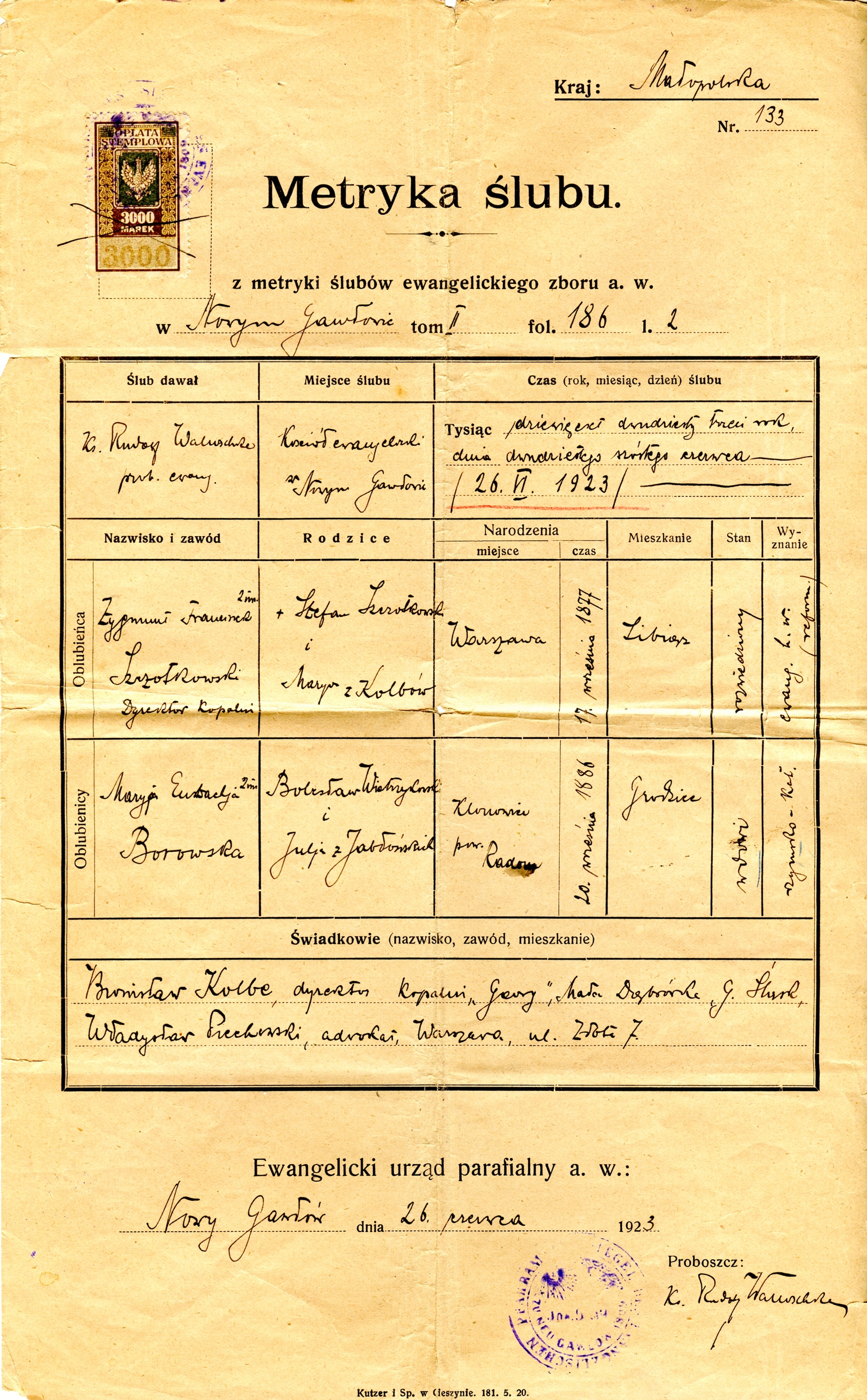 Marriage certificate of Zygmunt Szczotkowski (1923)